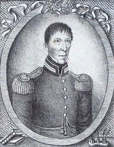 José Daniel Rodrigues da Costa (1757 — 1832) foi um poeta português